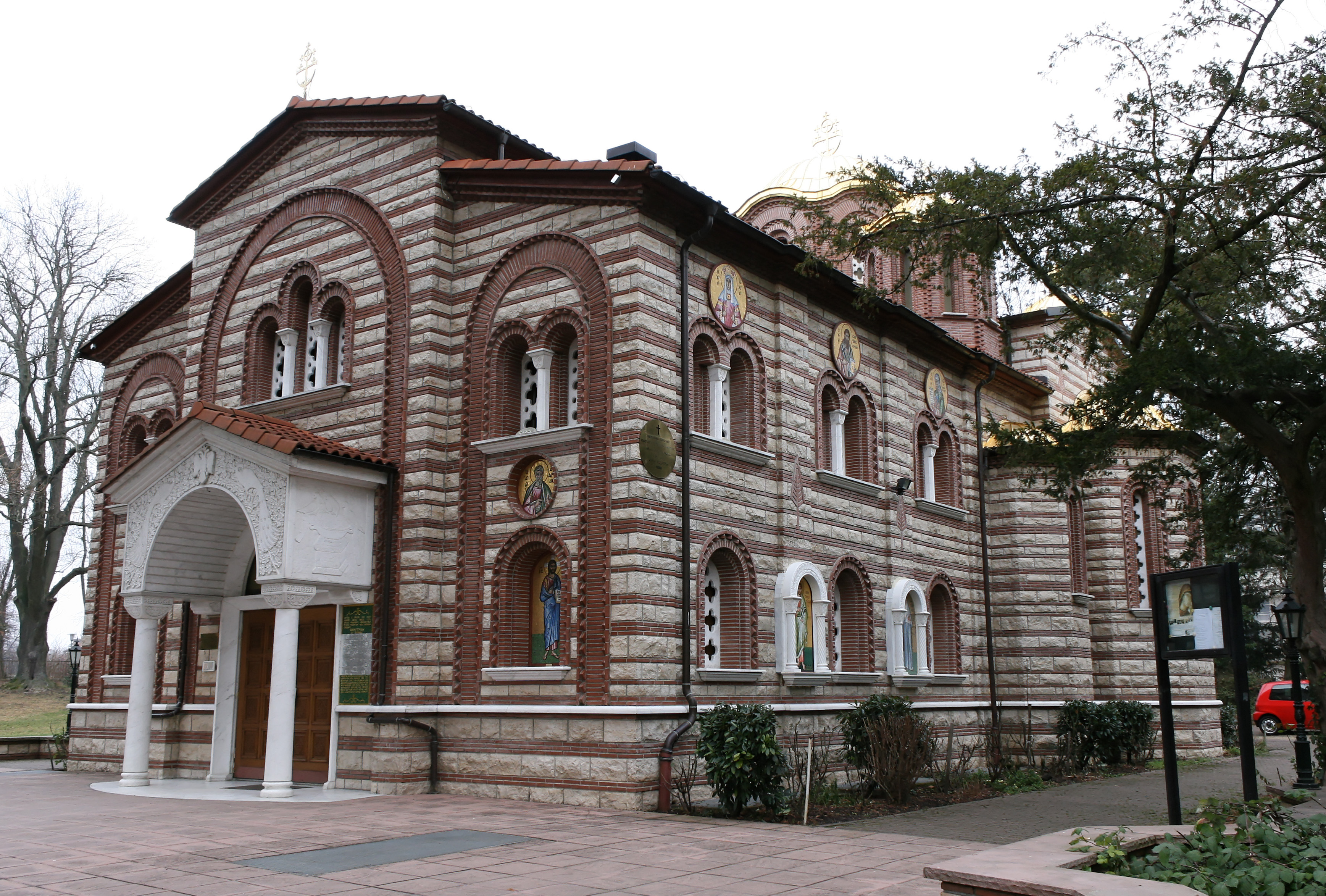 Georgioskirche in Frankfurt am Main-Westend, Sebastian-Rinz-Straße 2a